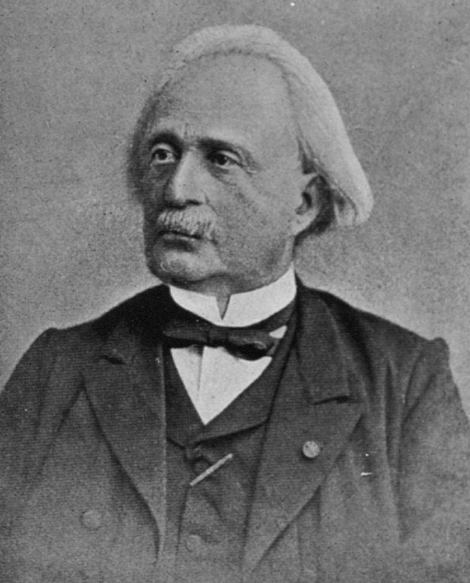 Jules Oppert, german-french philologist Jules Oppert, deutsch-französischer Altorientalist